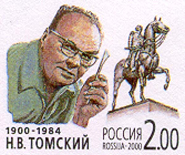 Почтовая марка России - Томский Николай Васильевич